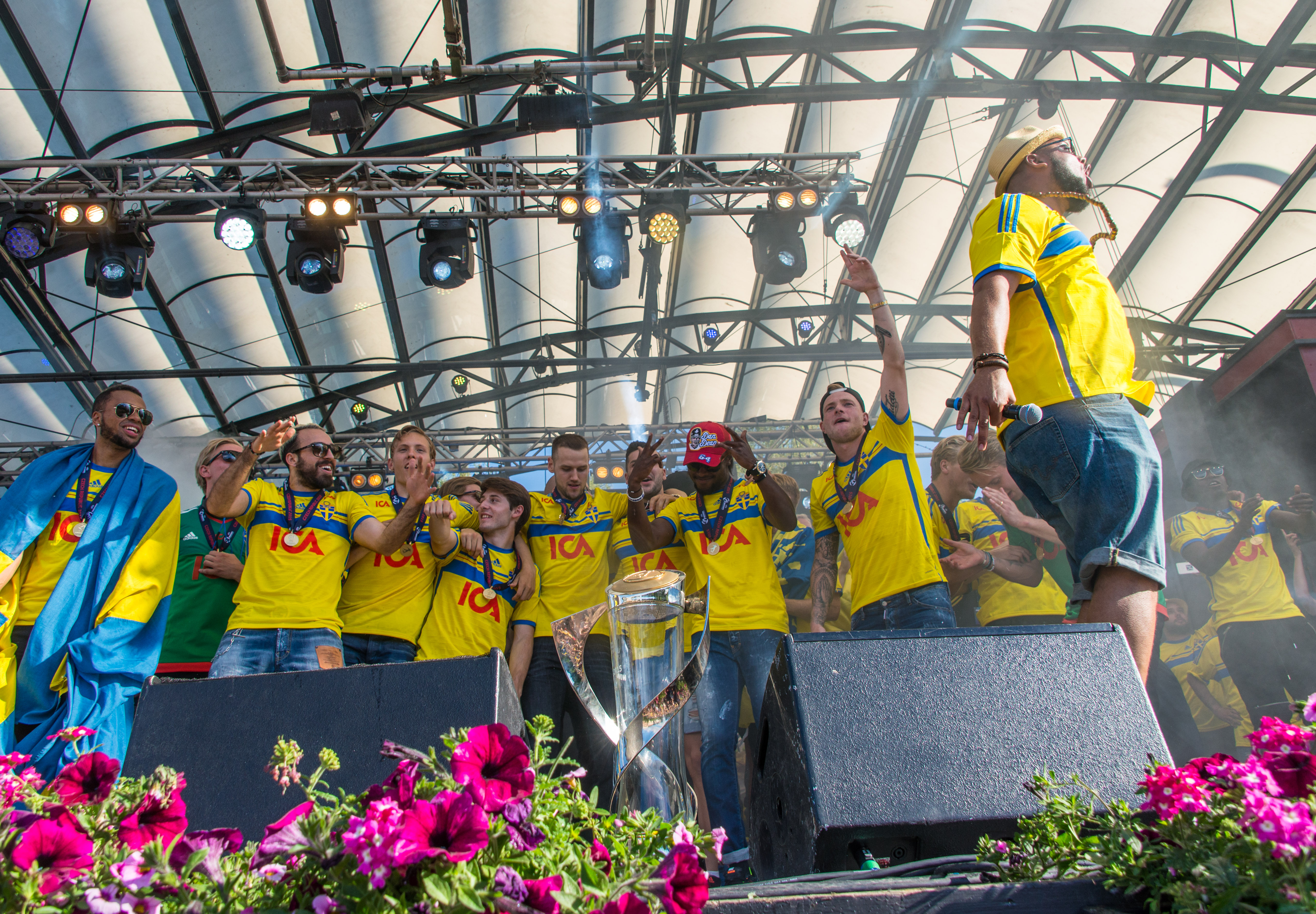 Sveriges U21-landslag blir hyllade i Kungsträdgården i Stockholm den 1 juli av 1000-tals fans efter guldet i U21-Europamästerskapet i fotboll 2015.